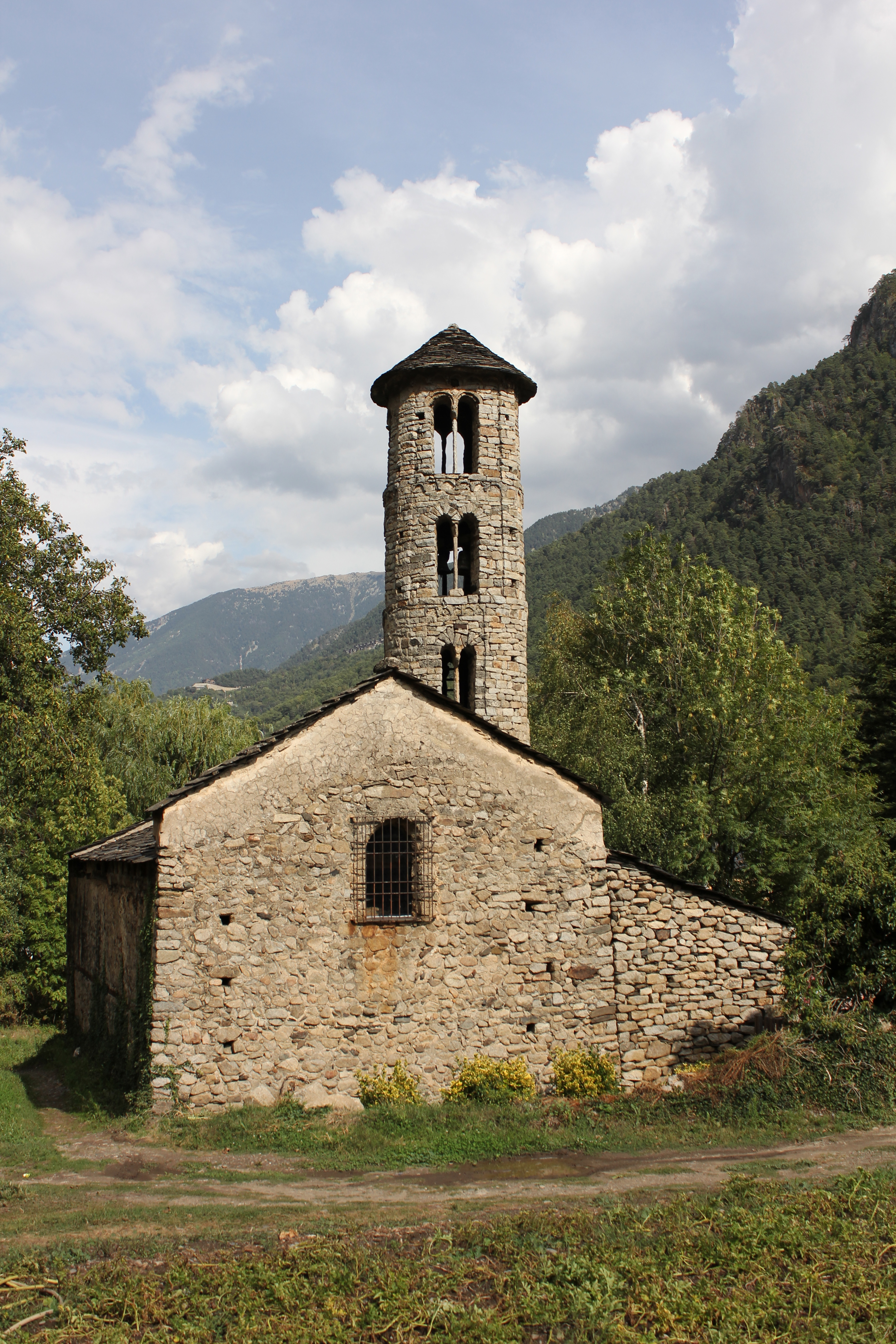 Església de Santa Coloma